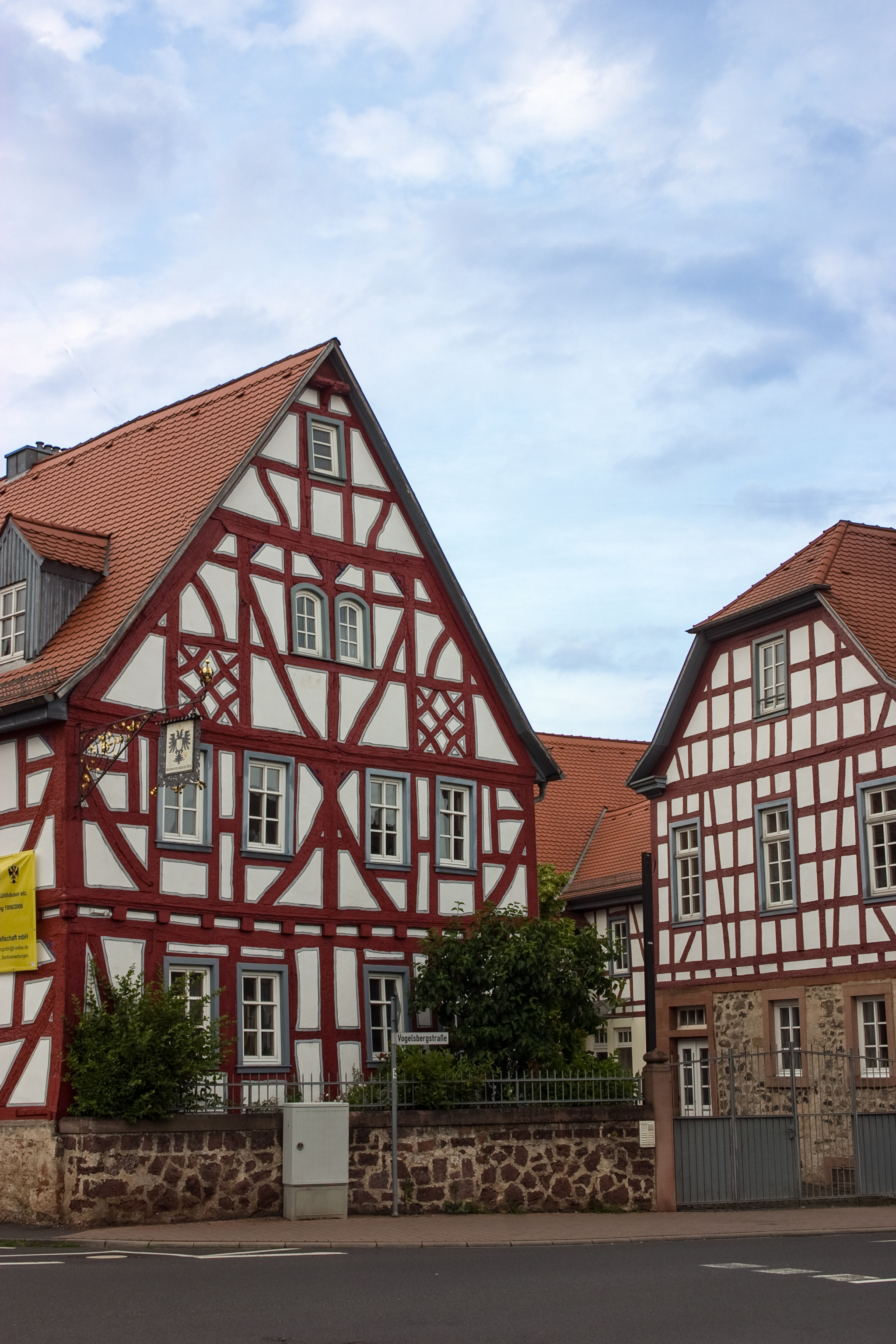 Gasthaus „Zum Schwarzen Adler“ in Altenstadt, Hessen, in Deutschland.